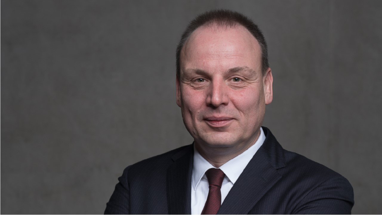 Michael Weirich